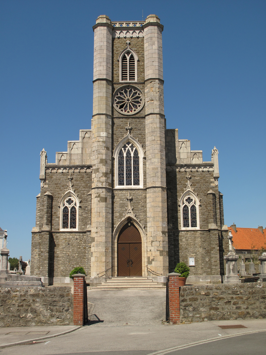 Saint-Martin-Boulogne église